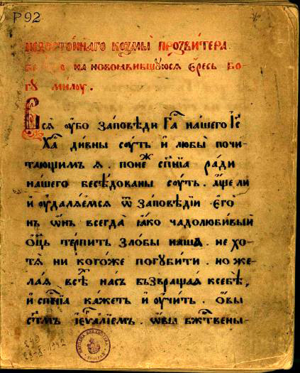 Беседа на јерес богумилу, Sermon against bogomils heresy